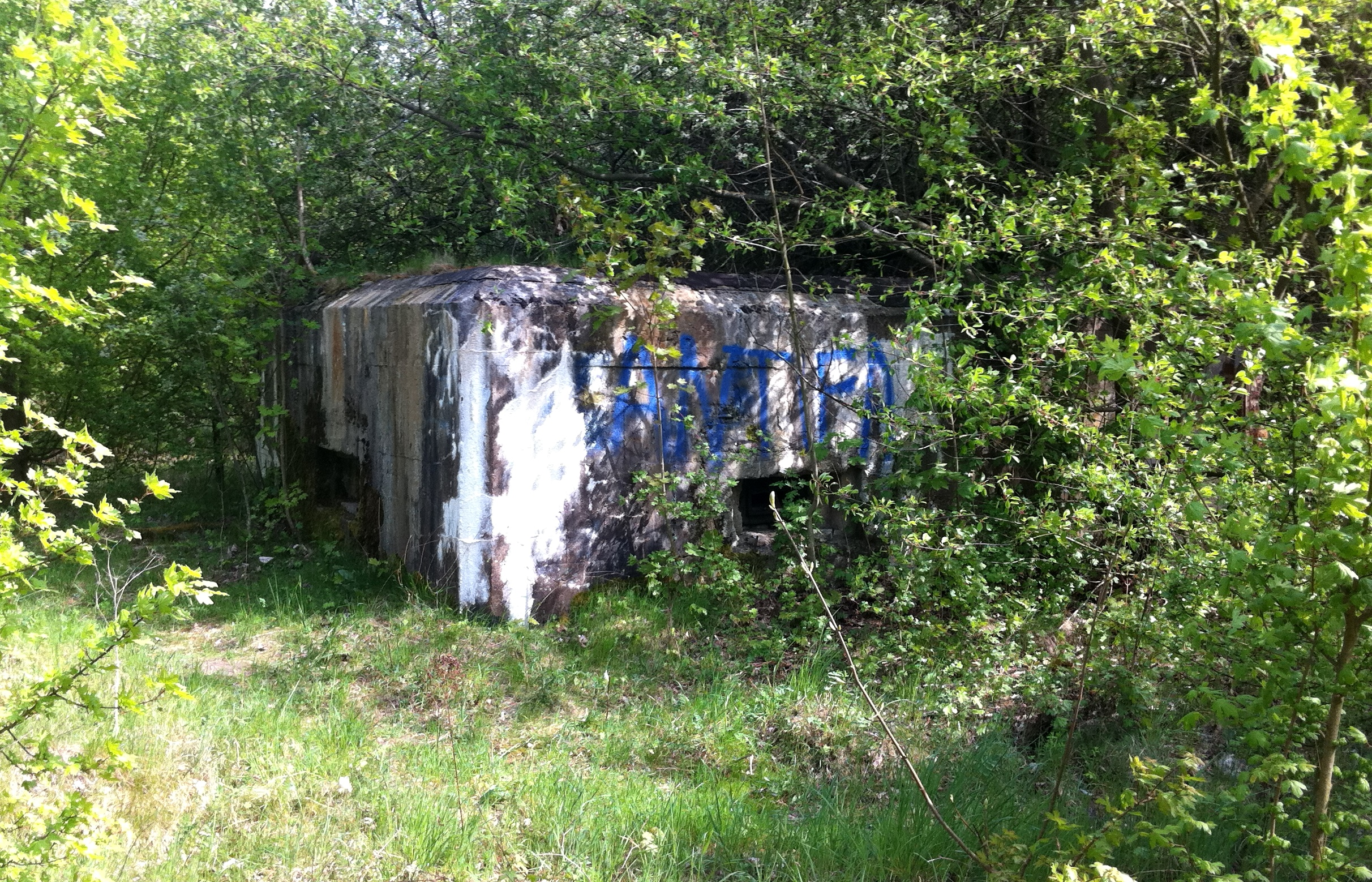 Bunkeranlage auf den Sohlener Bergen